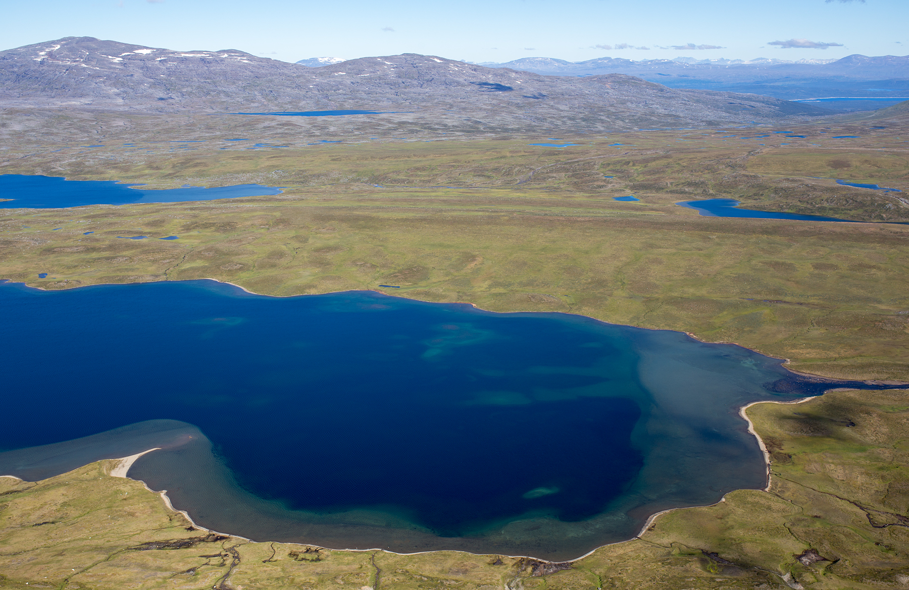 Utsikt från Stibok mot östra Stibokjávrre.